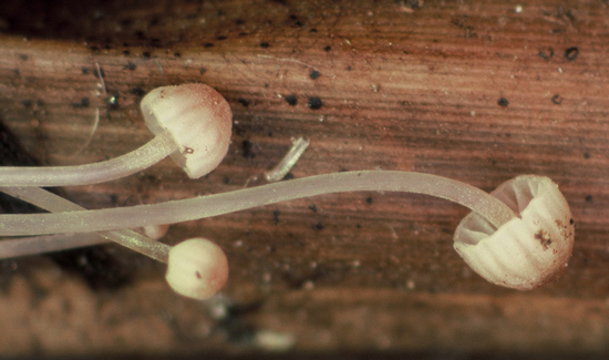 Sopparten storrhette (Mycena riparia).